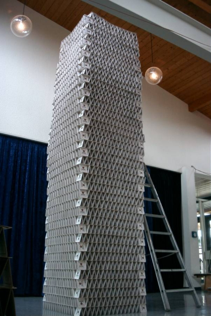 Bierdeckel Weltrekord 2003 - fertiges Objekt.